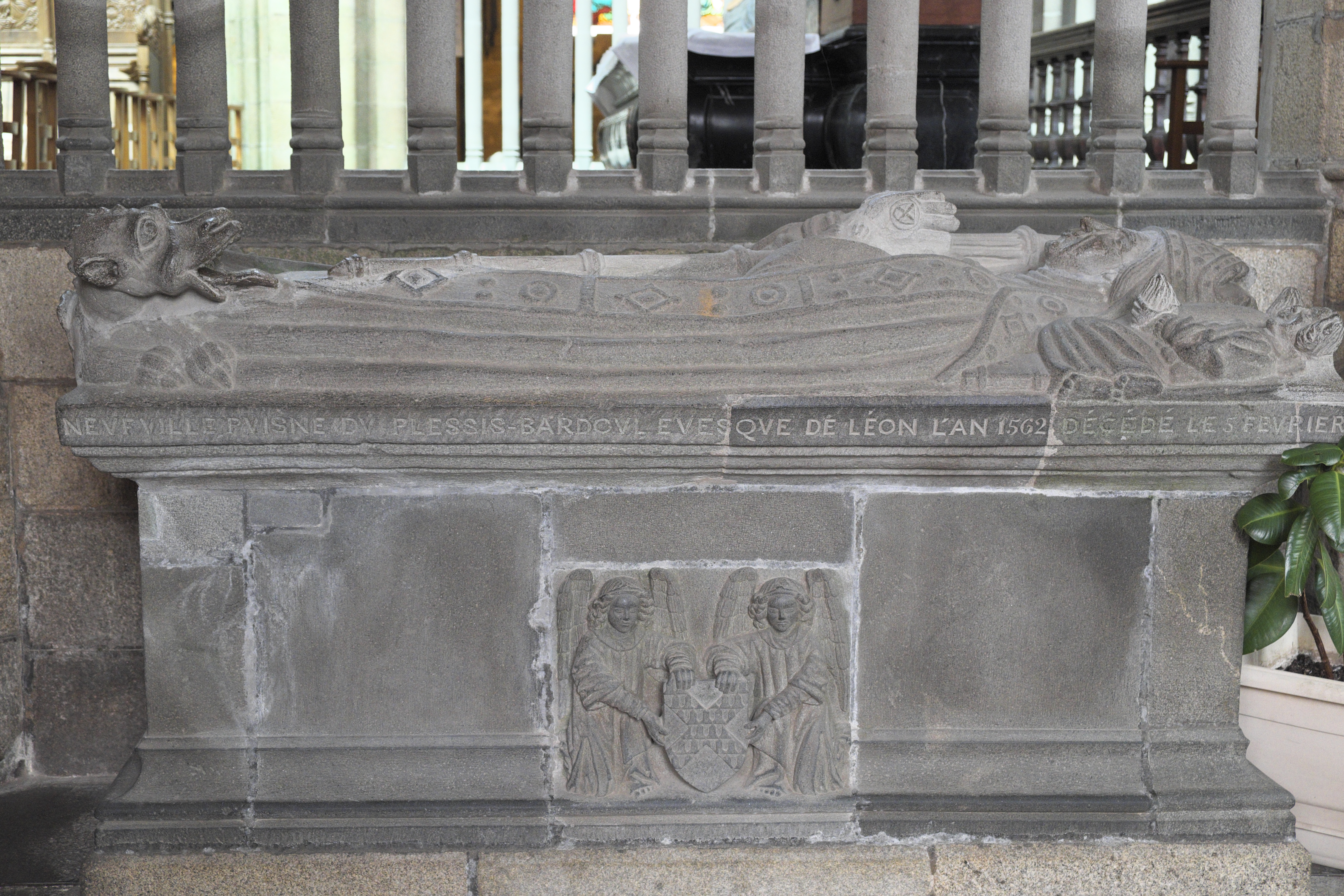 Ehemalige Kathedrale Saint-Paul-Aurélien in Saint-Pol-de-Léon im Département Finistère (Region Bretagne/Frankreich), Grab des Bischofs Roland de Neufville († 1613)